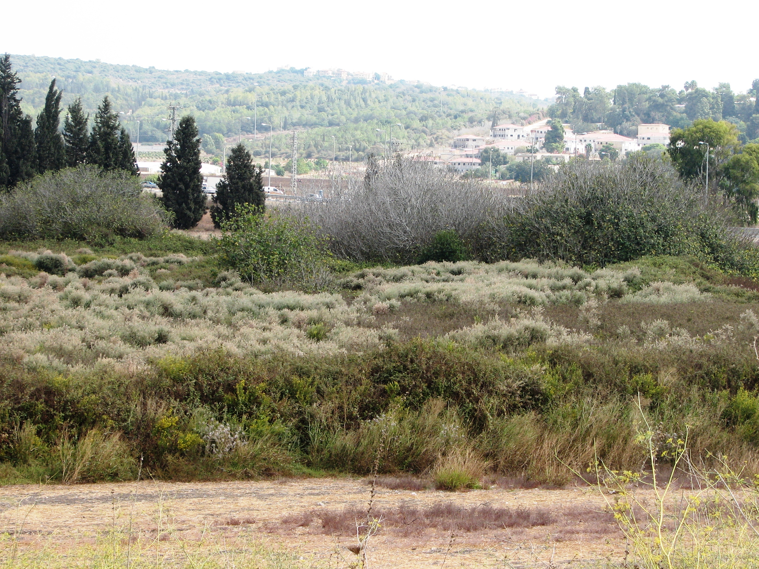 "En Arubot" Nature Reserve, an habitat for Banded Newt שמורת עין ארובות באזור השרון הצפוני, מהווה בית גידול לח לטריטון הפסים מבט מתל אסור